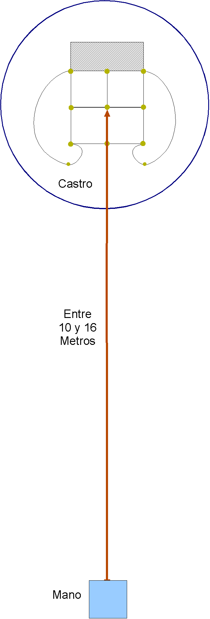 Dimensiones y disposición de la bolera en el bolo leonés.